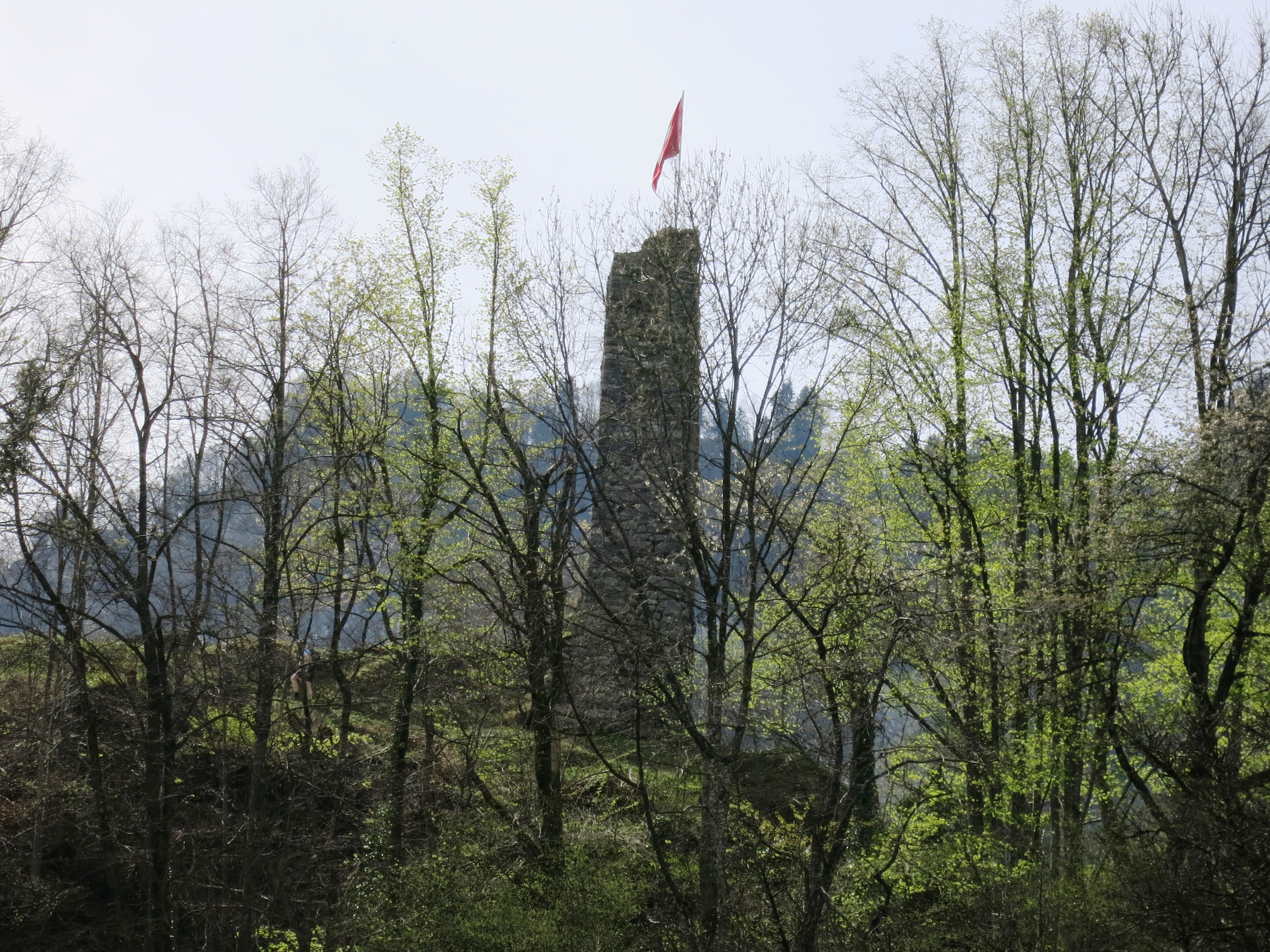 Ruine Vorburg, Oberurnen GL, Schweiz